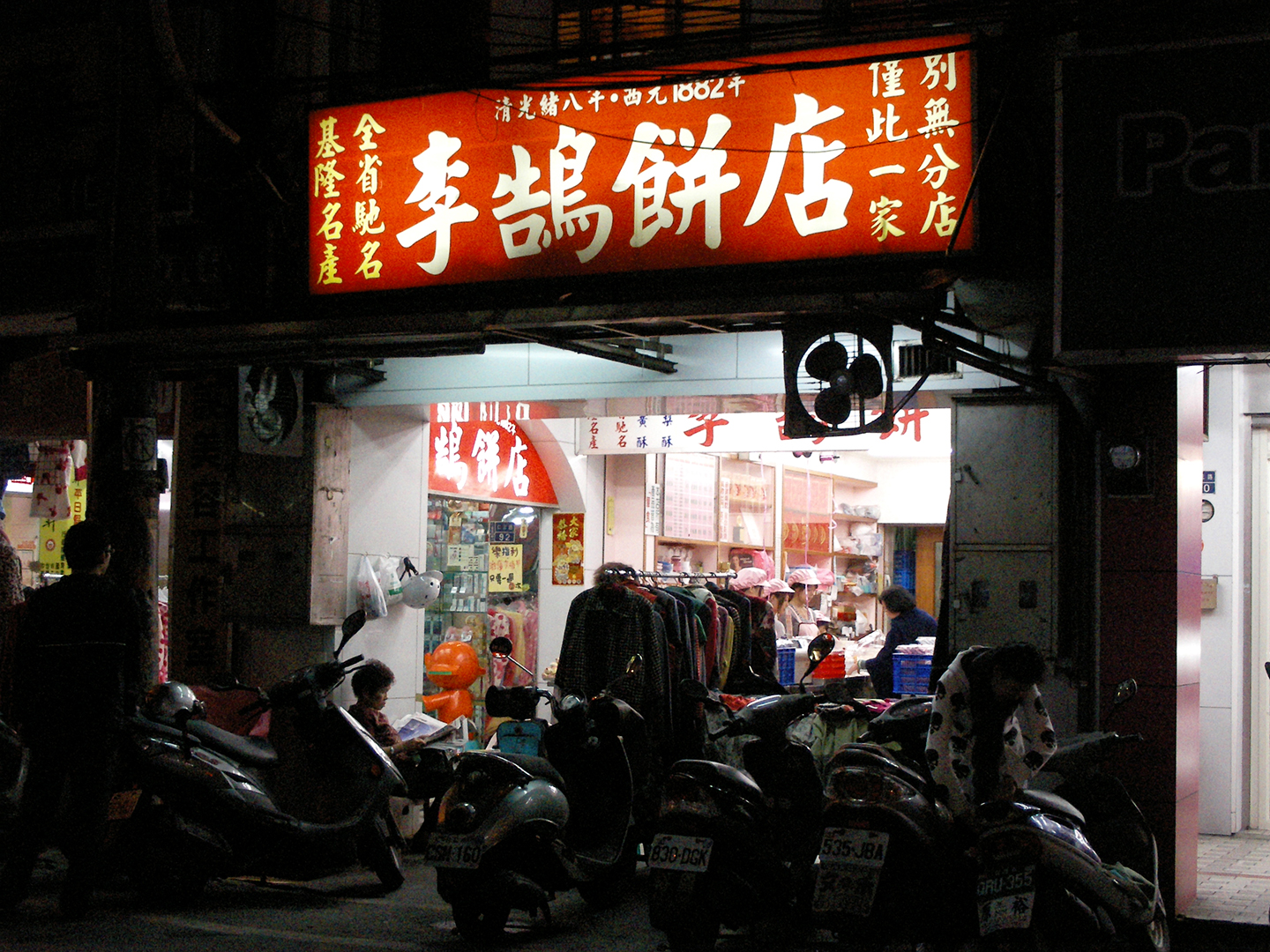 李鵠餅店，位於基隆市仁愛區仁三路90號1樓。